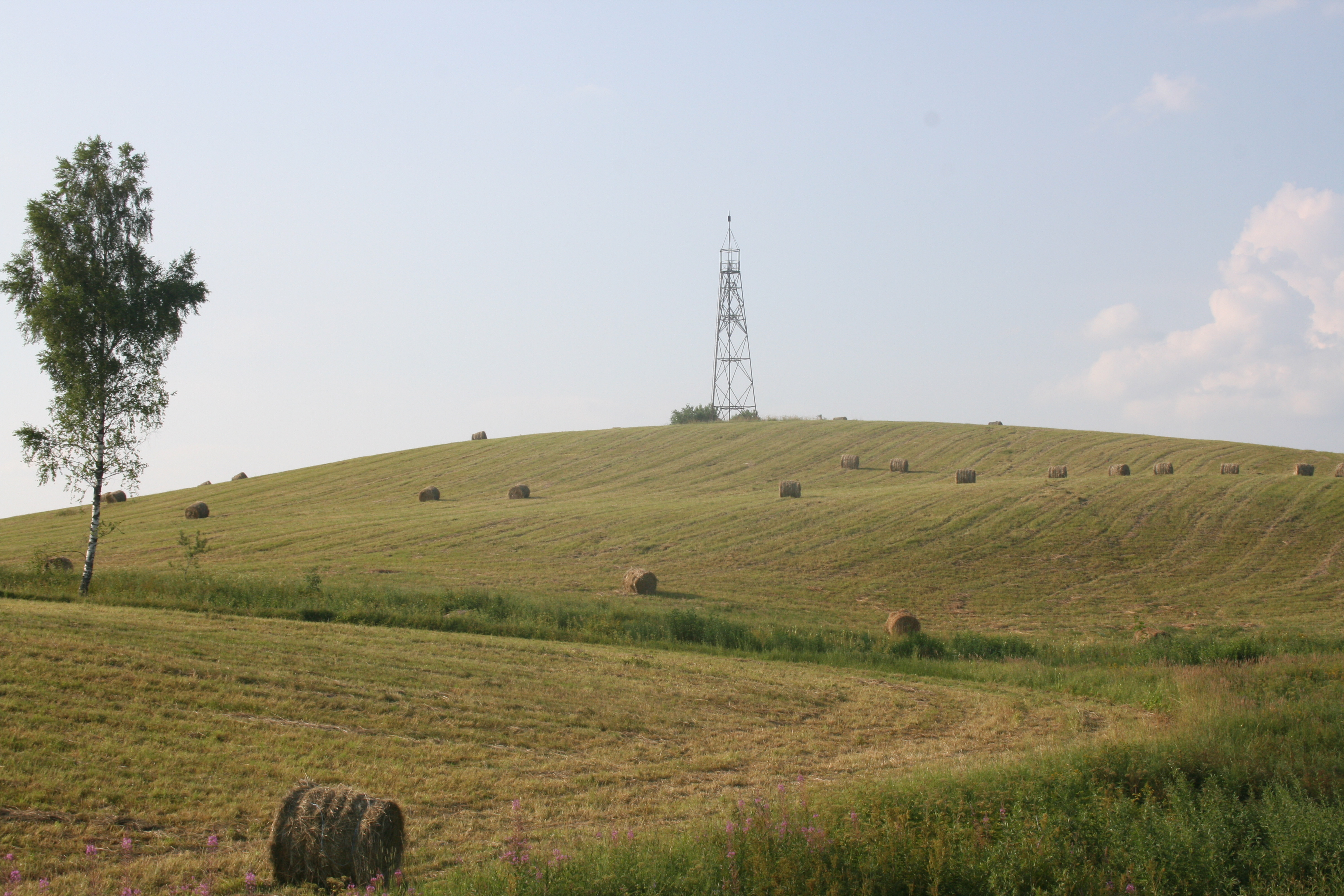 Spinduļu kalns